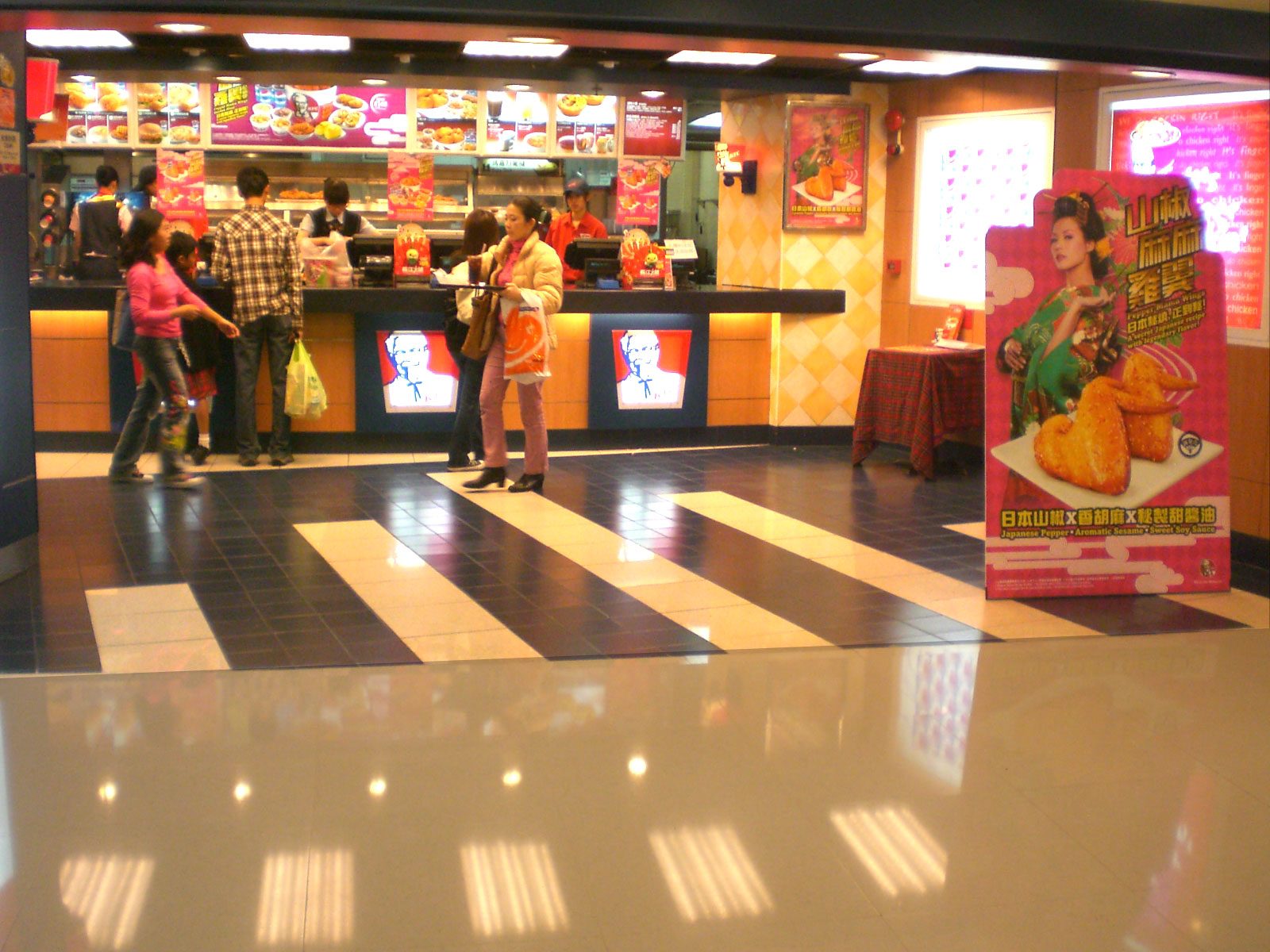 元朗區元朗新市鎮青山公路元朗段 元朗廣場 肯德基